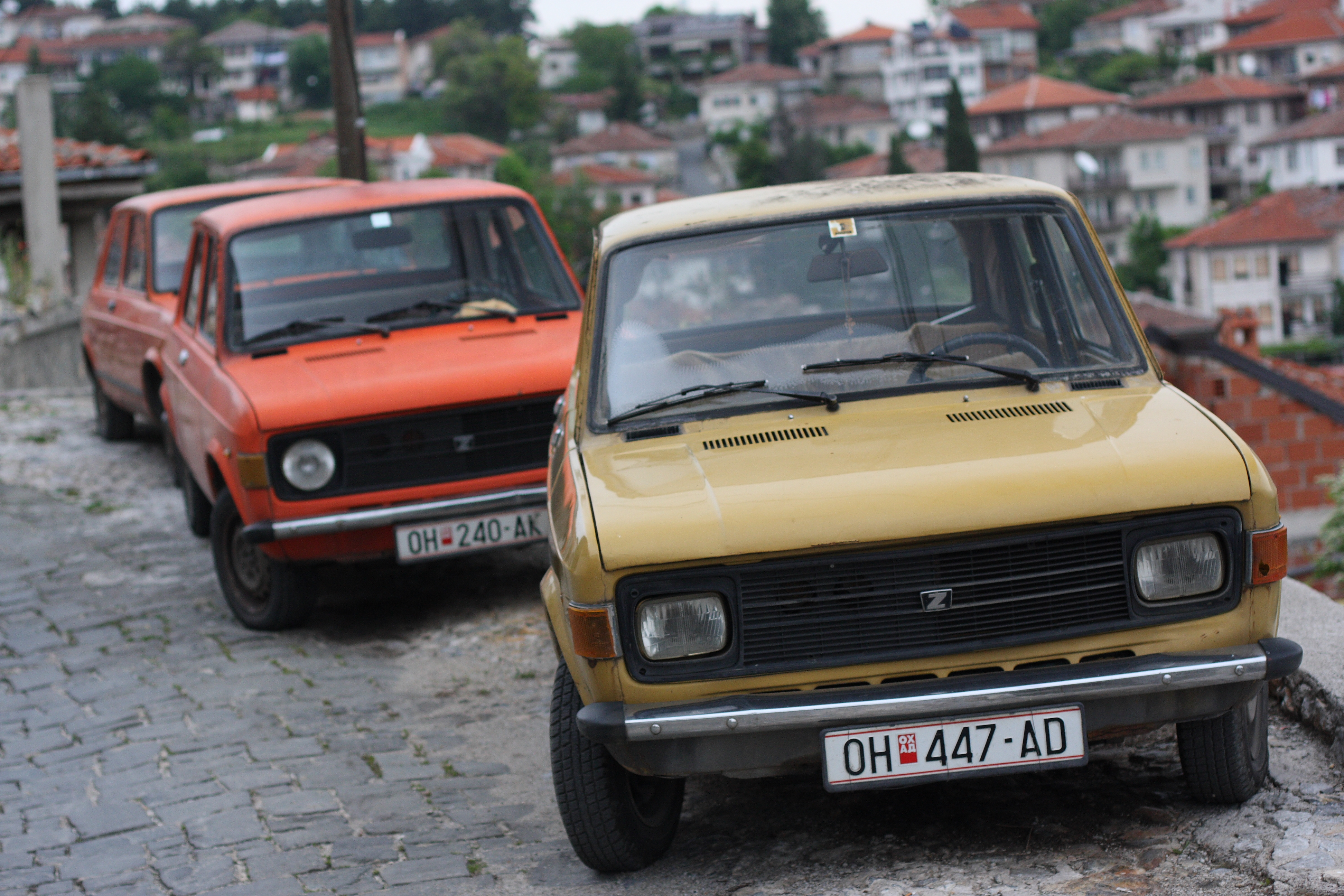 Ohrid, Macedonia